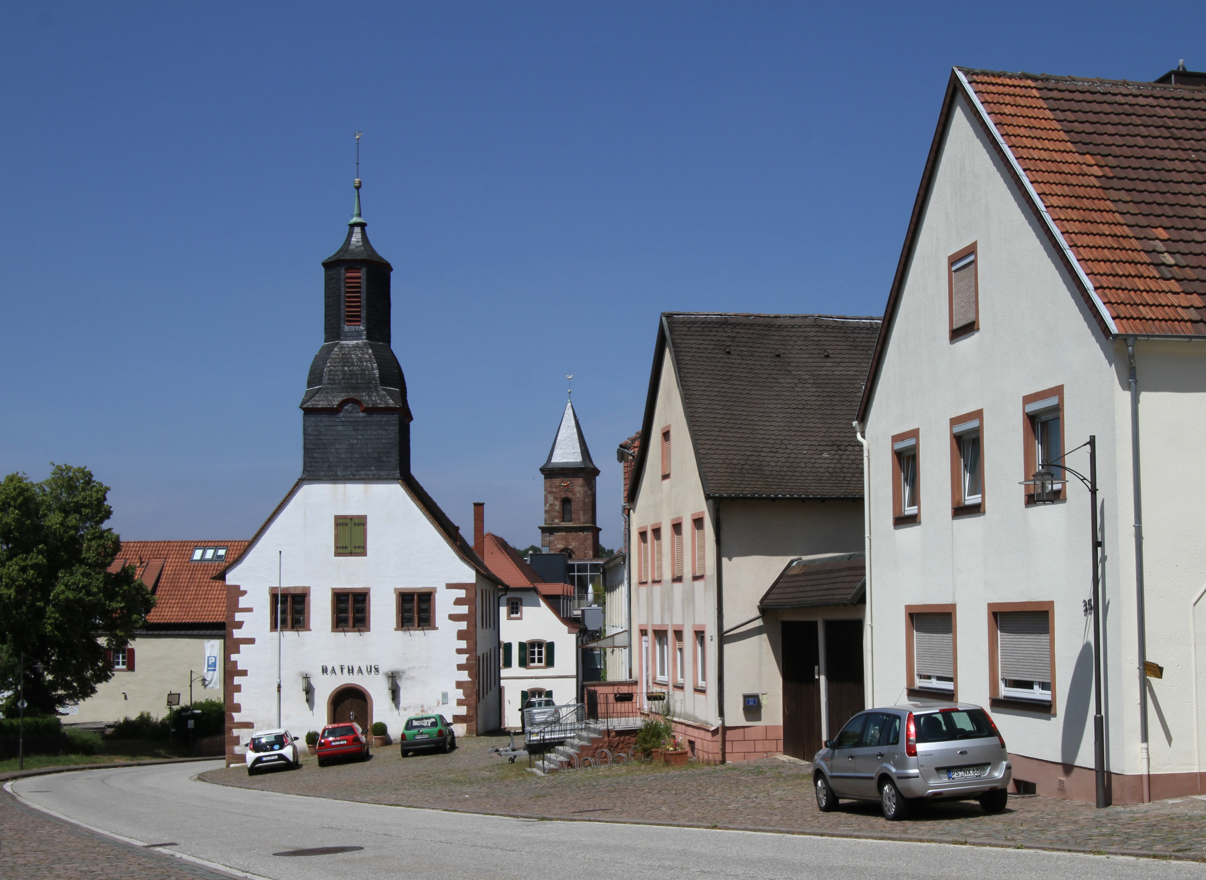 Rathaus (Hornbach)